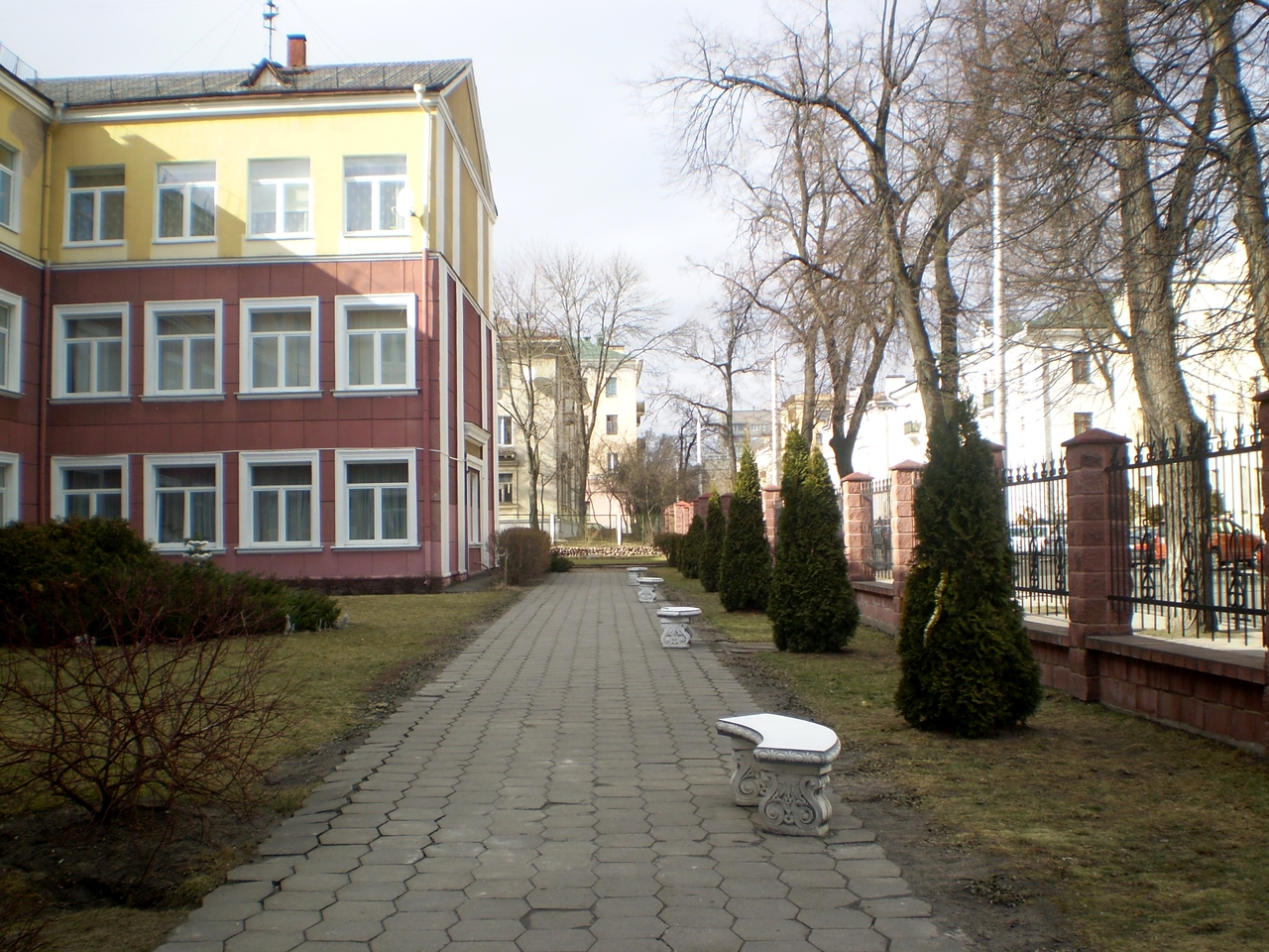 Дарожка ў двары гімназіі №1